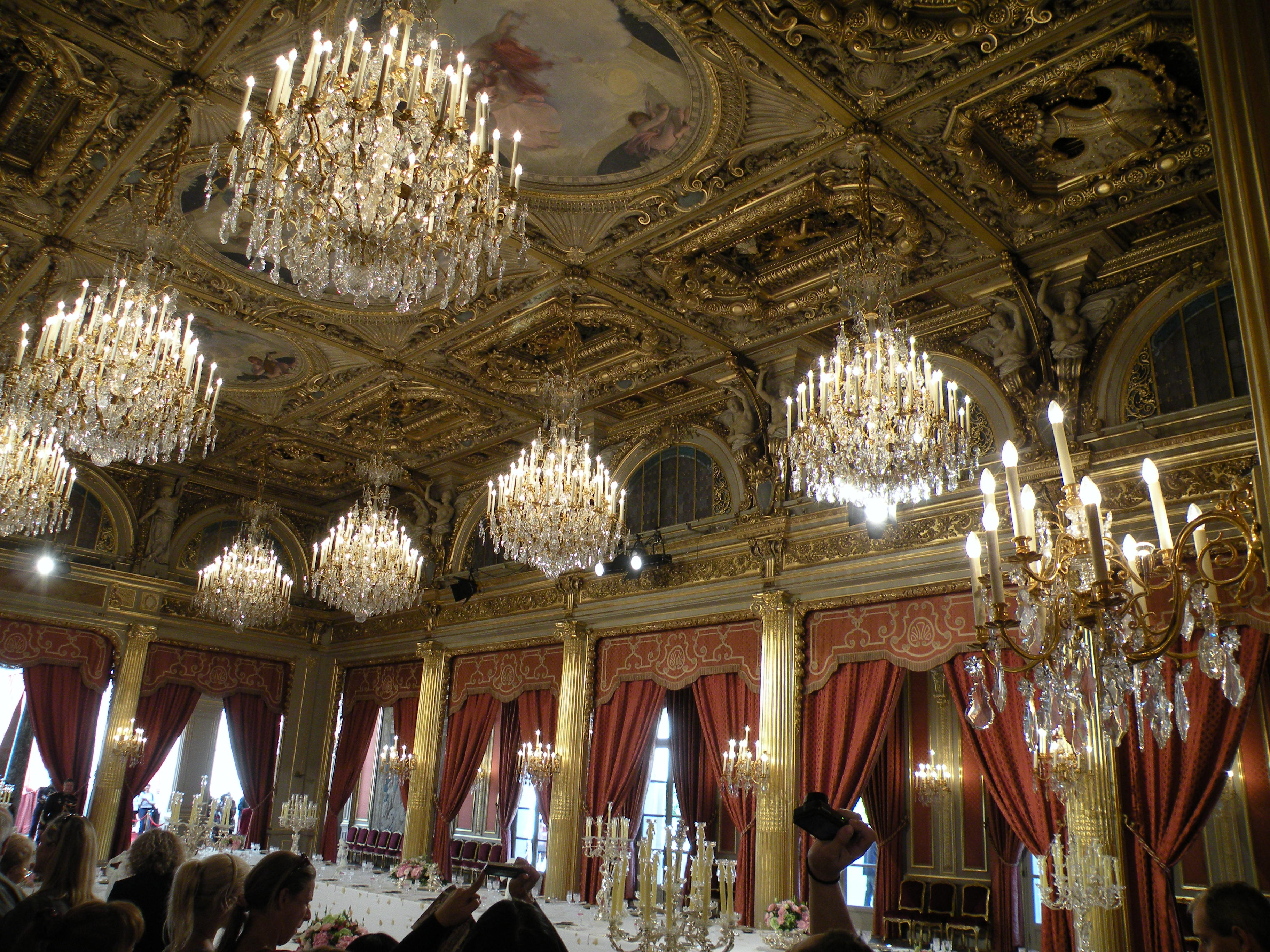 Salle des fêtes - Palais de l'Élysée